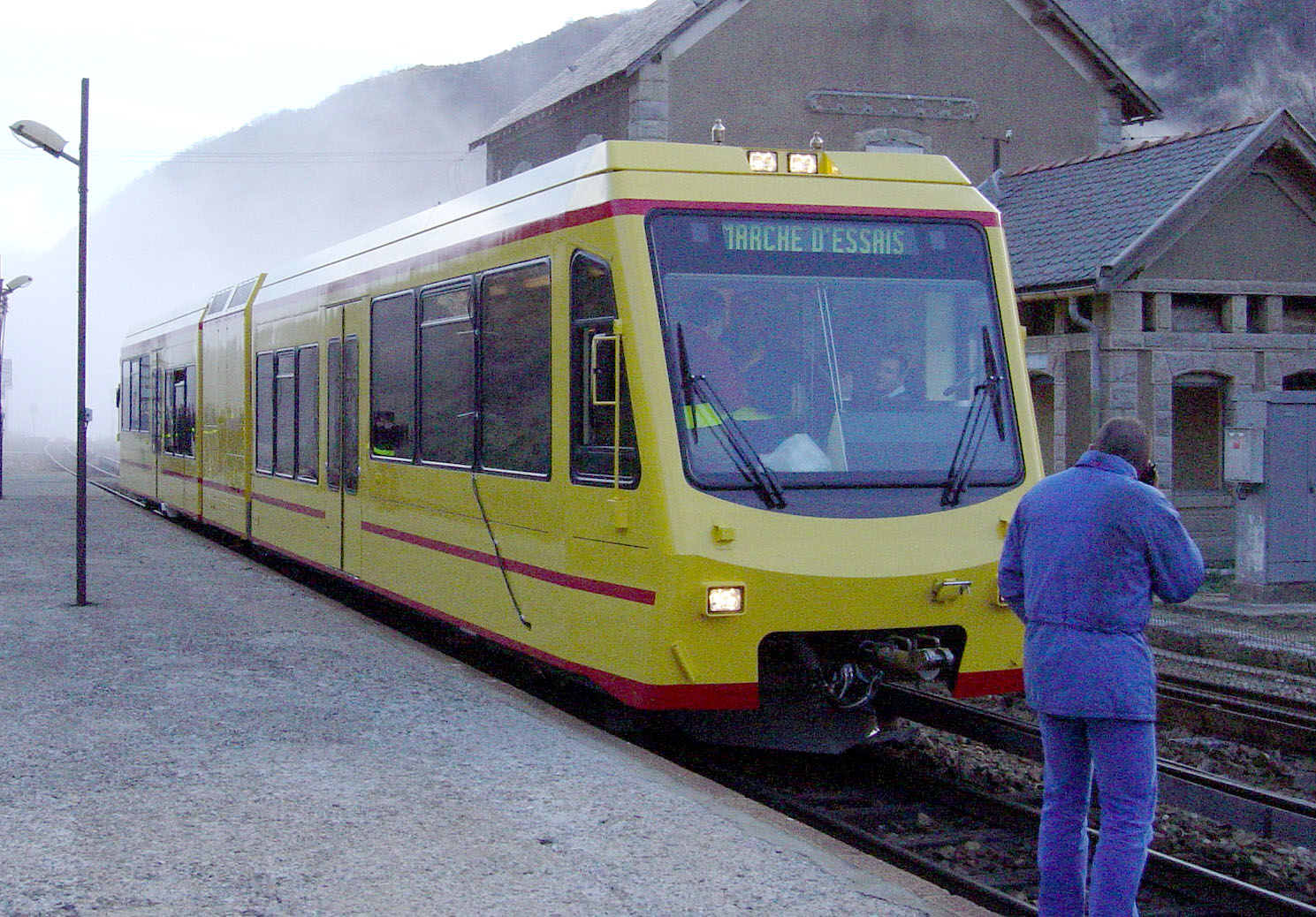 Nouvelle automotrice Z150 lors d'une marche d'essai, en décembre 2003. Train Jaune Z151 multiple unit (cropped image from fr.wikipedia)